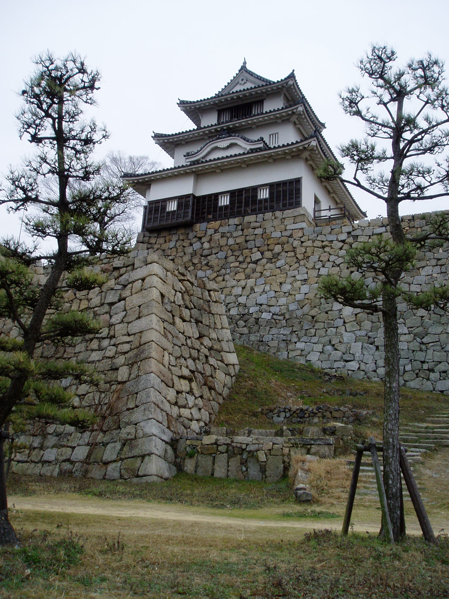 Keep of Marugame Castle (丸亀城) in Marugame, Kagawa, Japan